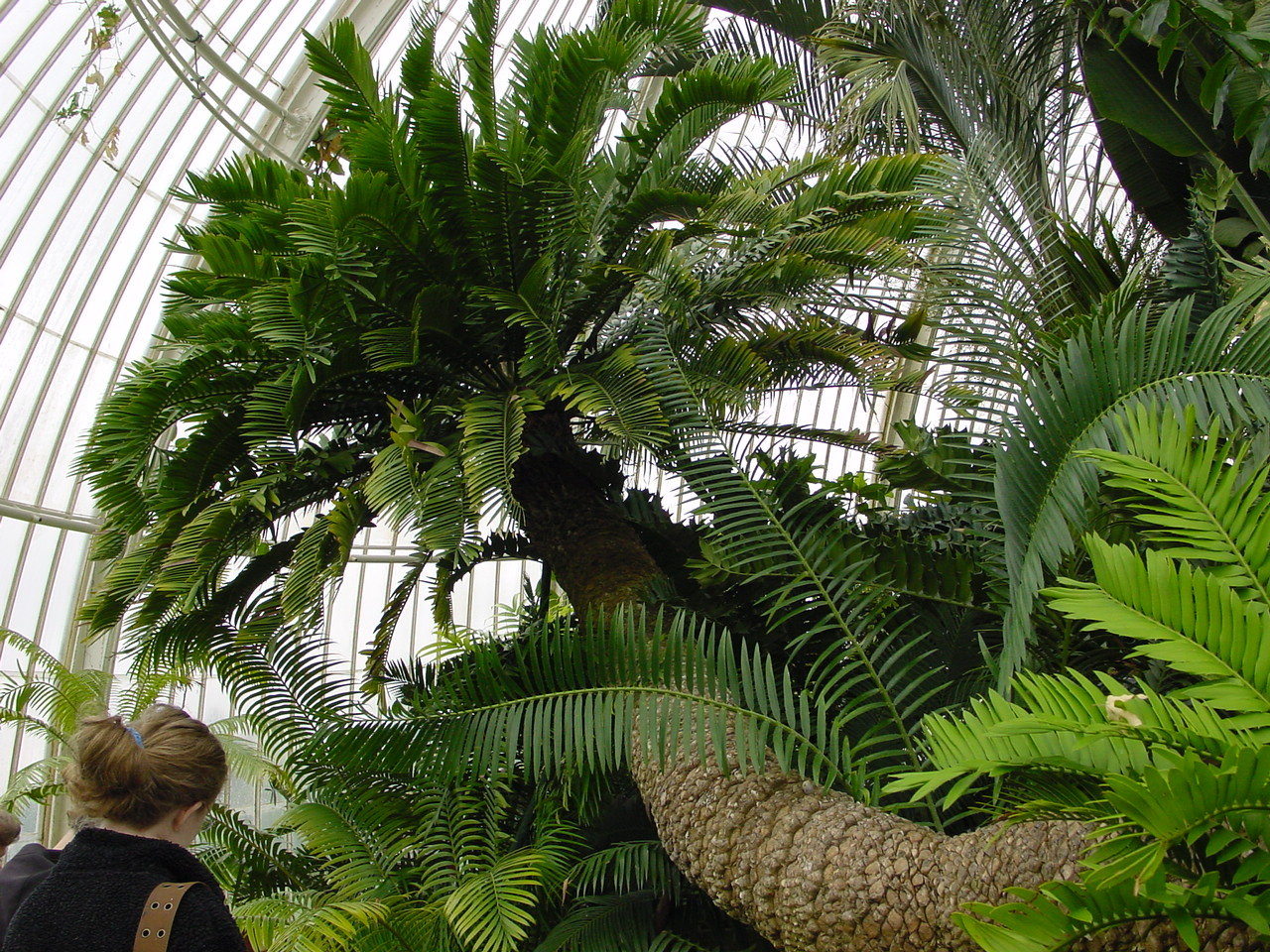 Kew Gardens 2006